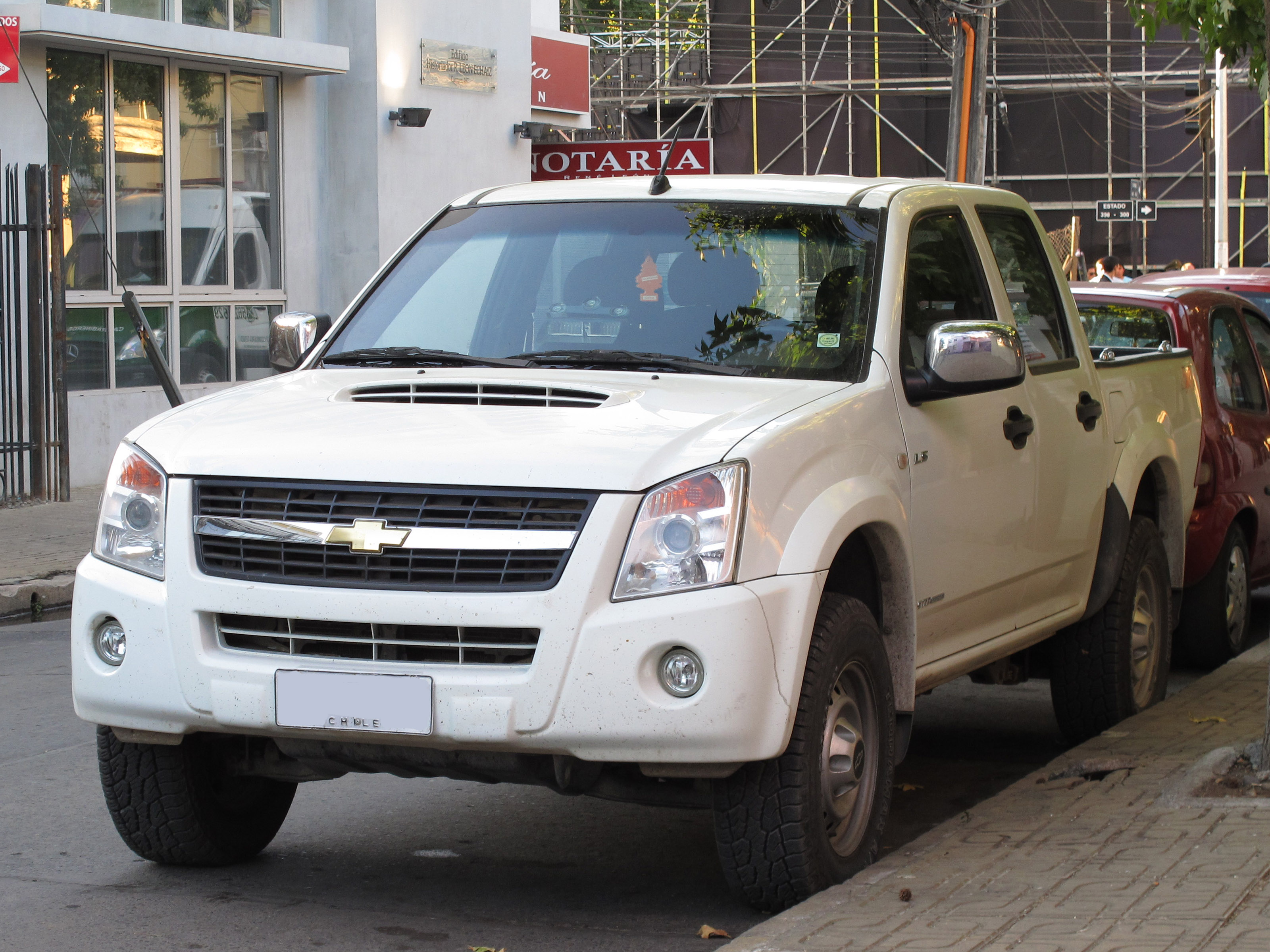 Chevrolet DMax LS 2.5 TD 4x4 2013